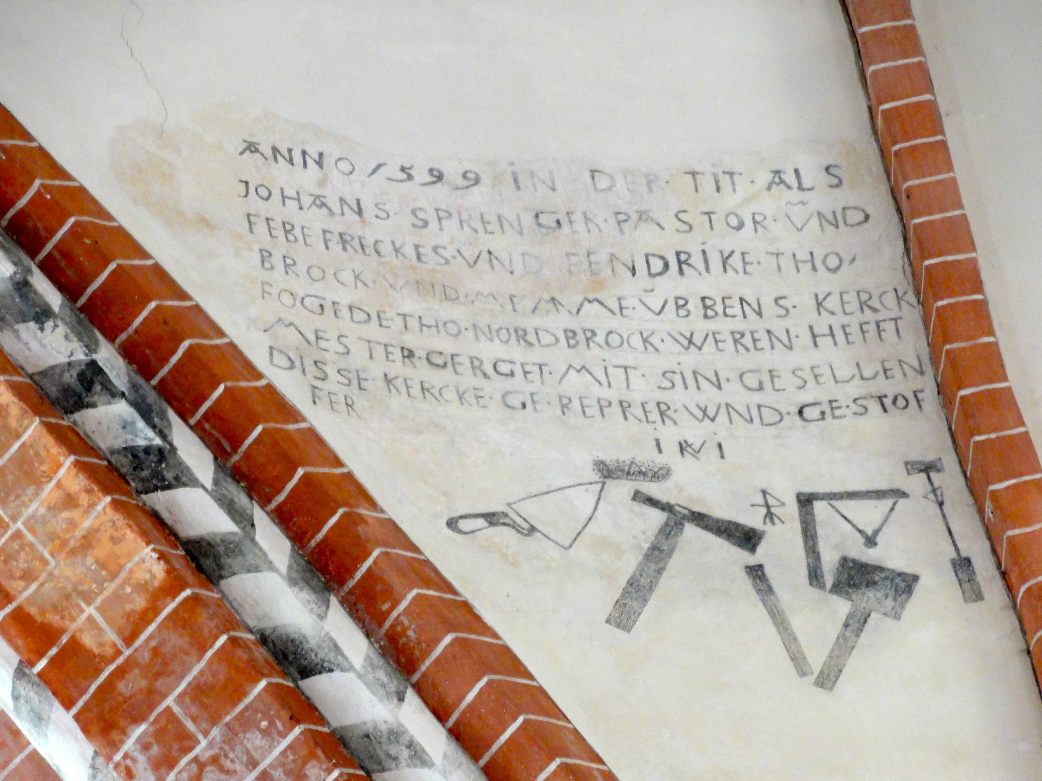 Tekst in de kerk van Noordbroek, waaruit blijkt dat de kerk in 1599 werd hersteld door meester Gerget en zijn gezellen, in de tijd dat Johan Sprenger pastor en Febe Freckes, Fendrike van Borck en Memme Ubbens kerkvoogden van Noordbroek waren